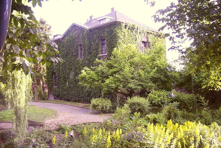 Bildbeschreibung:Rittergut wildenrath, Wanlo. Quelle: eigenes Foto Fotograf/Zeichner: bodoklecksel 15:29, 26. Jun 2006 (CEST). Datum: Juni 2006. Sonstiges